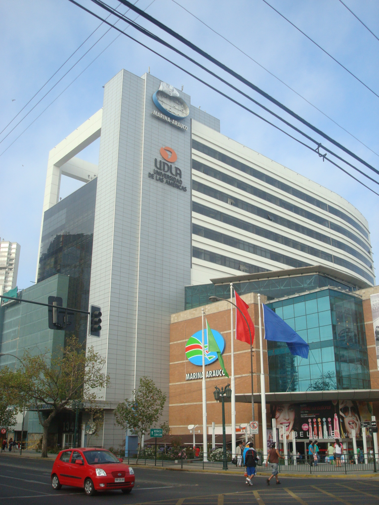 Monumento O'Higgins, Viña del Mar, Chile